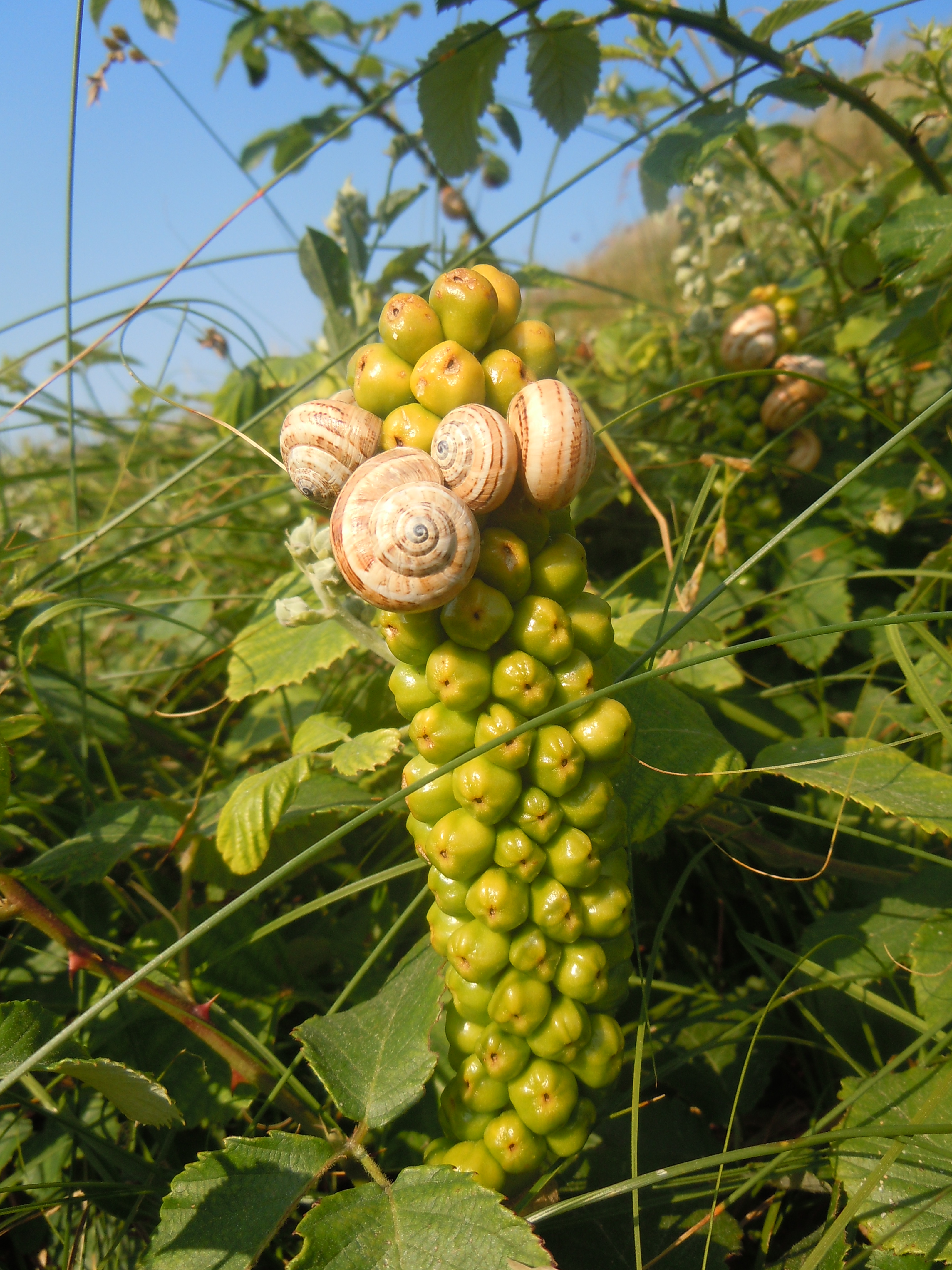 Infrutescence d' Arum maculatum hebergeant des Hygromiidae probablement Cernuella virgata , Dune de Donnant, Belle-Île-en-Mer